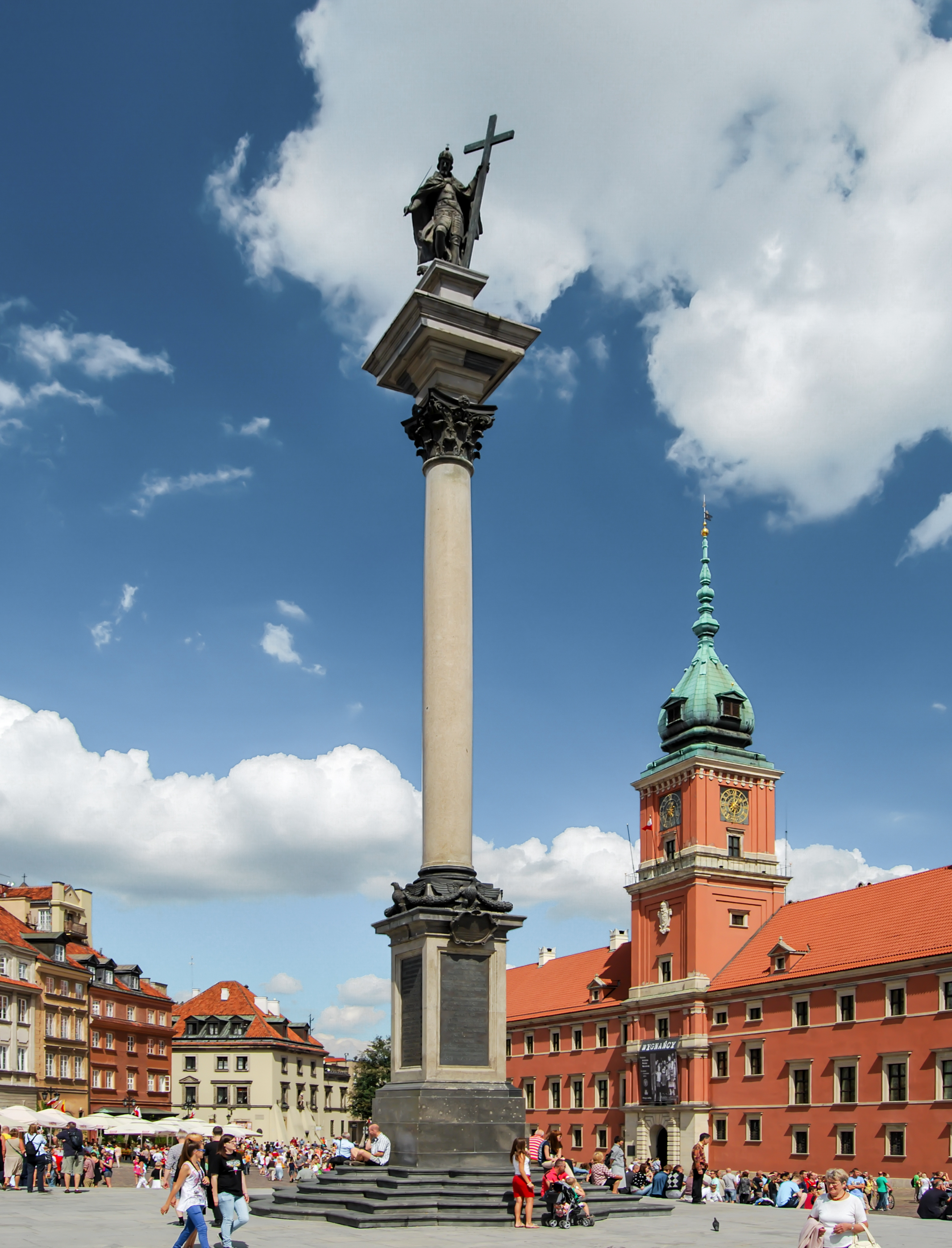 Warszawa, kolumna Zygmunta III Wazy, 1644, 1948-49